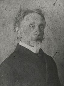 Edwin Teodor Płażek